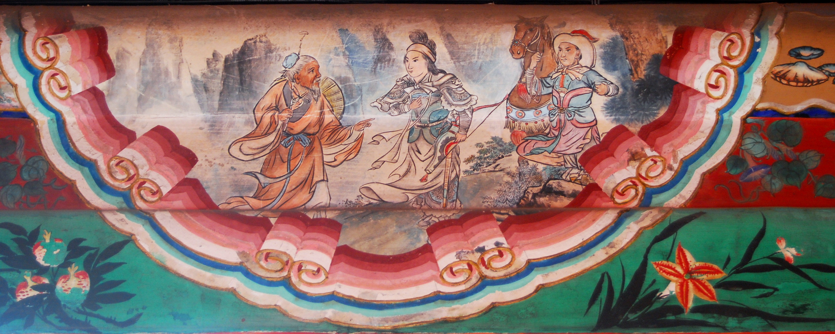 颐和园长廊上的彩绘：穆桂英寻访采药人